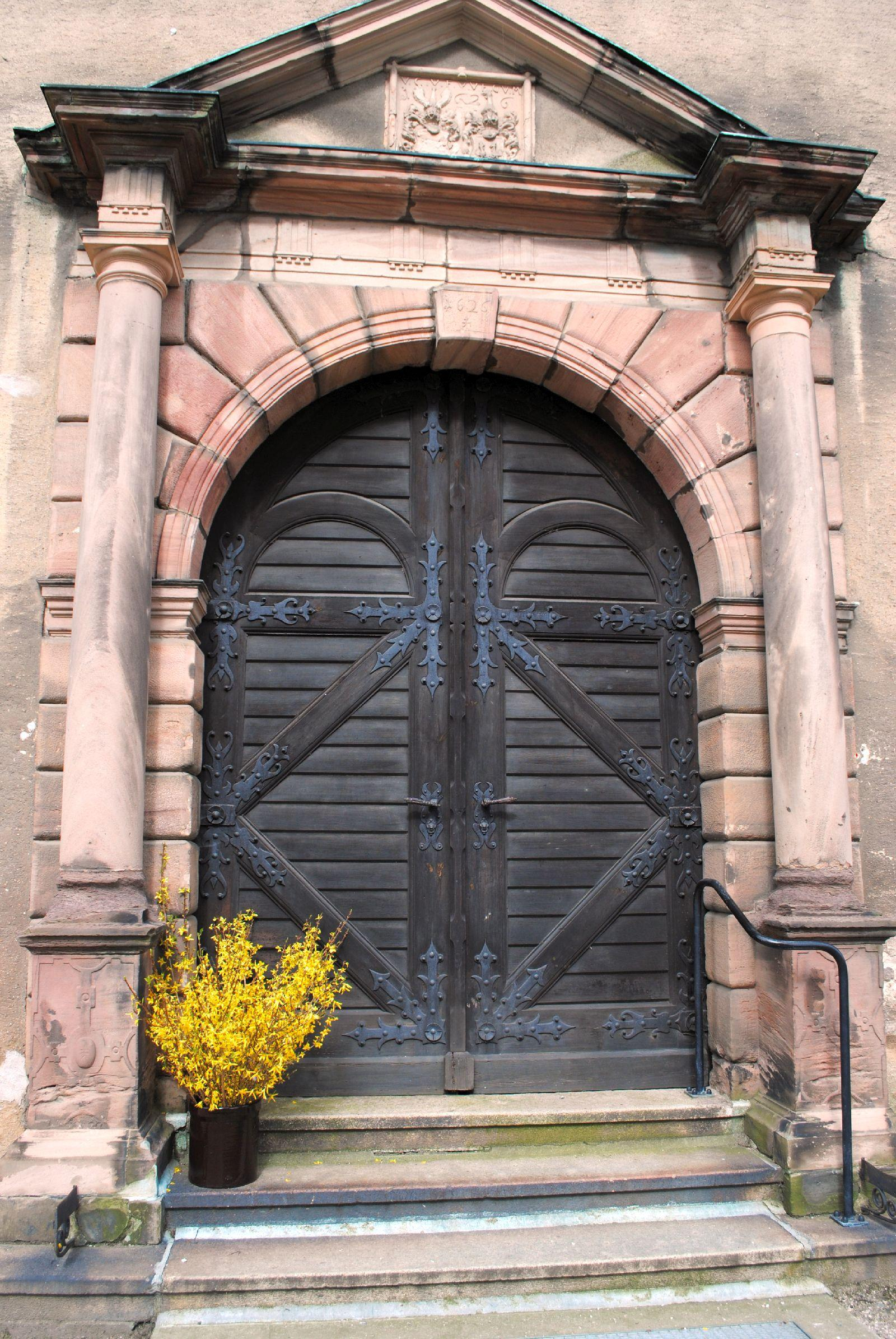 Eingangsportal der Salvatorkirche Kürbitz (Vogtland)